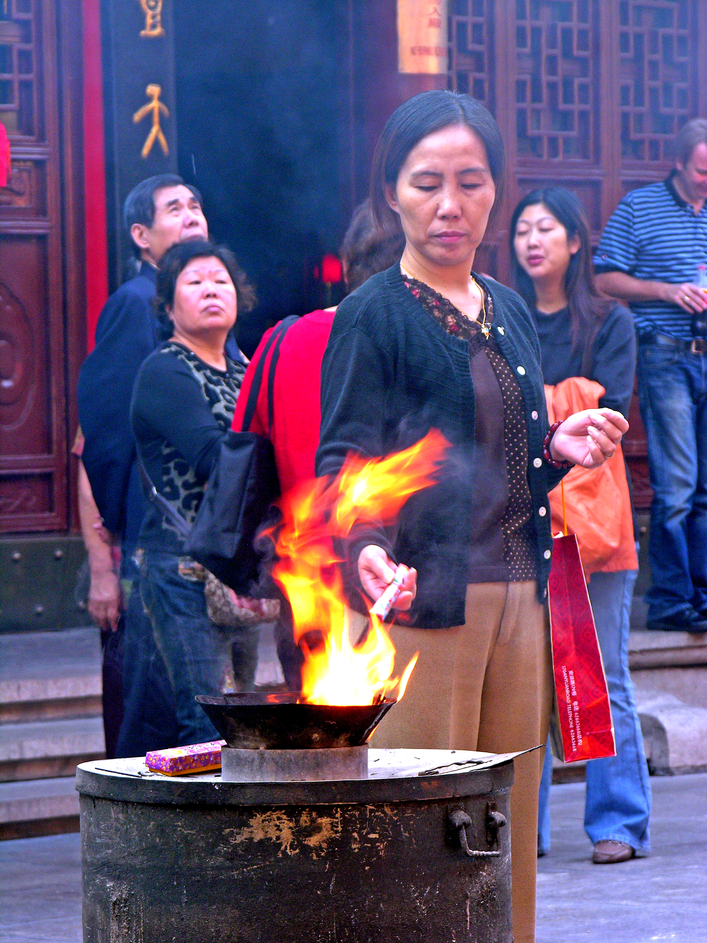 China-8117